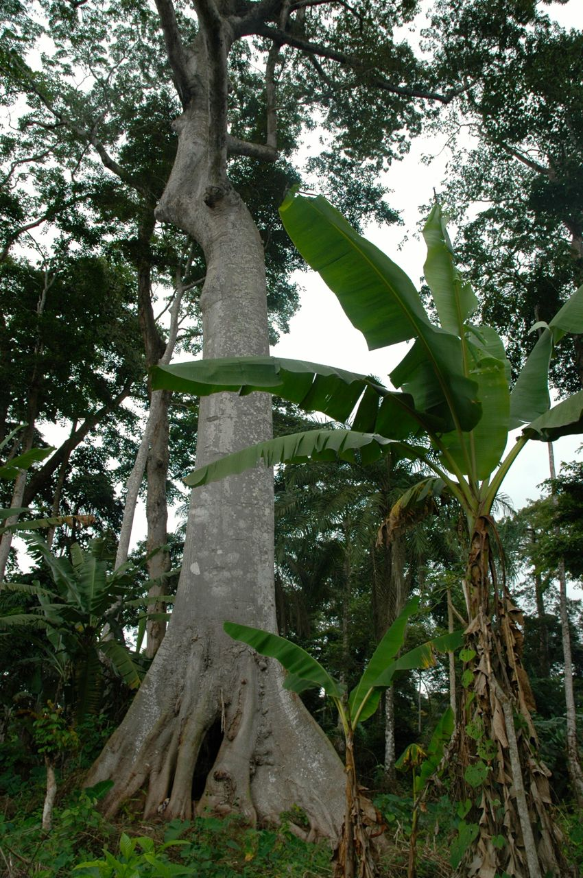 Paysage formé de bananiers et de grands arbres à Ebogo